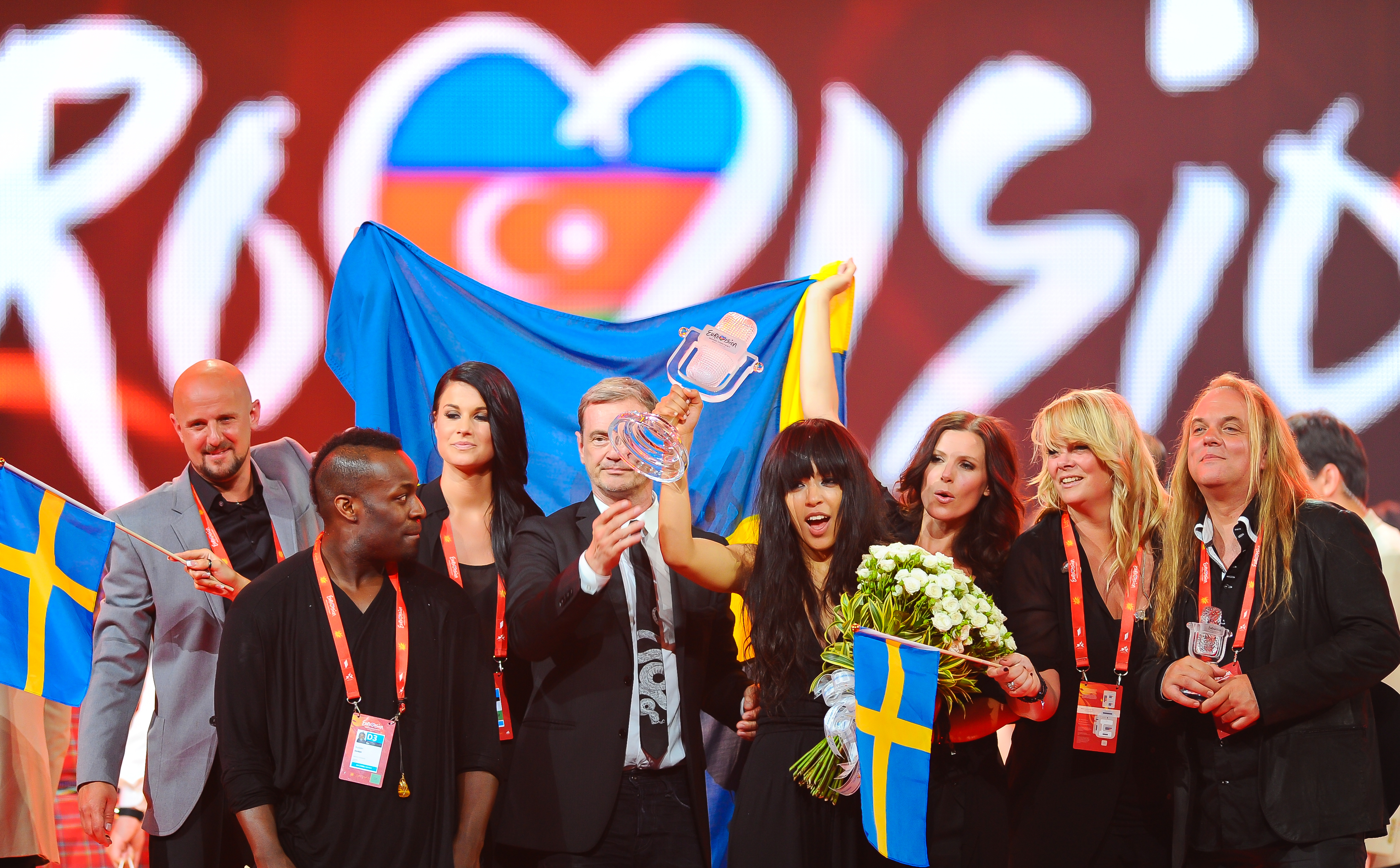 Финал Евровидение 2012